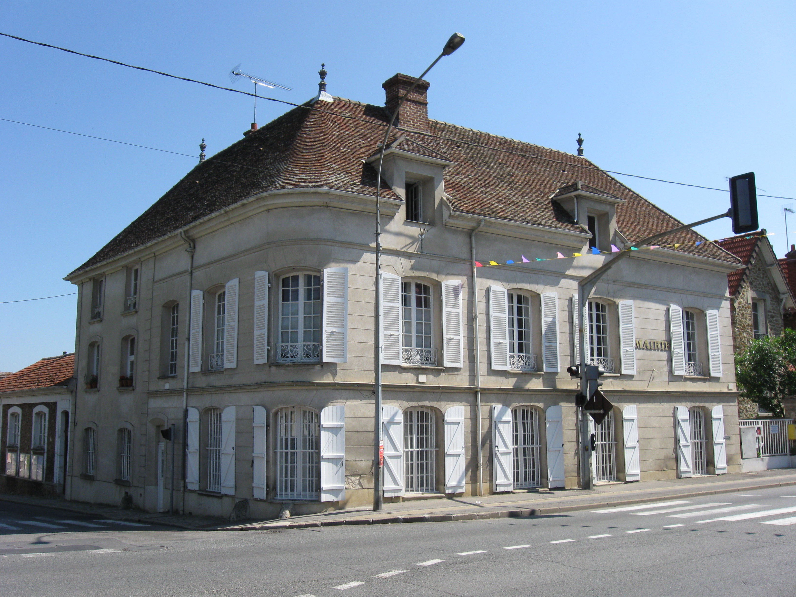 Mairie de St-Jean-les-Deux-Jumeau. (département de la Seine-et-Marne, région Île-de-France).